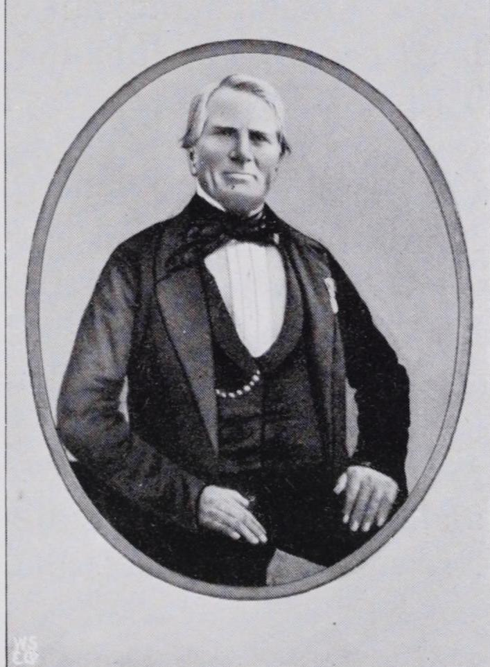 Illustrasjon hentet fra boken "Aremark og Ømark: en prestegjeldsbeskrivelse" av Diesen, Einar (1862-1932) og utgitt av Fabritius Forlag (Kristiania, 1909)